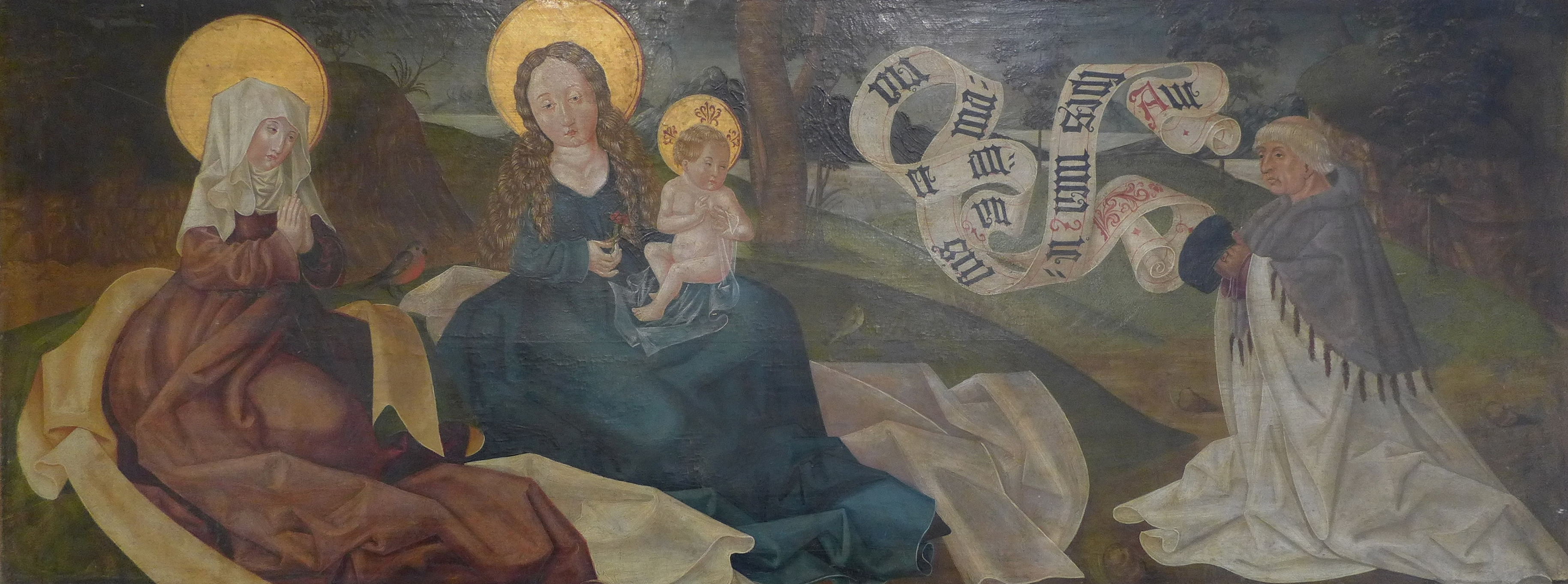 Basilika Seckau, Bischofskapelle, Maria-Krönungsaltar, Predella, Anna selbdritt (1507)